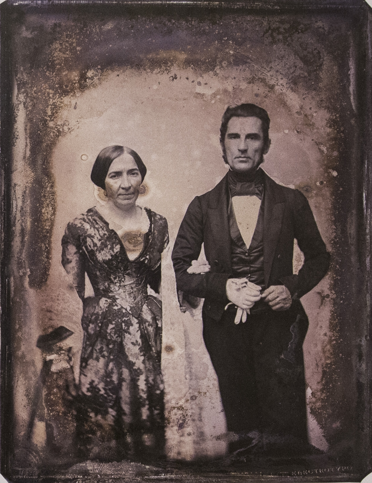 Valentín Alsina (1802-1869) y su esposa, Antonia Maza. Daguerrotipo, 1854. Autor no identificado. Complejo Museográfico Enrique Udaondo. En la sede del Ministerio de Cultura de la Nación Argentina, en la calle Alsina 465, se exhibe la muestra de Daguerrotipos "Primeros retratos históricos argentinos Daguerrotipos 1840-1860".